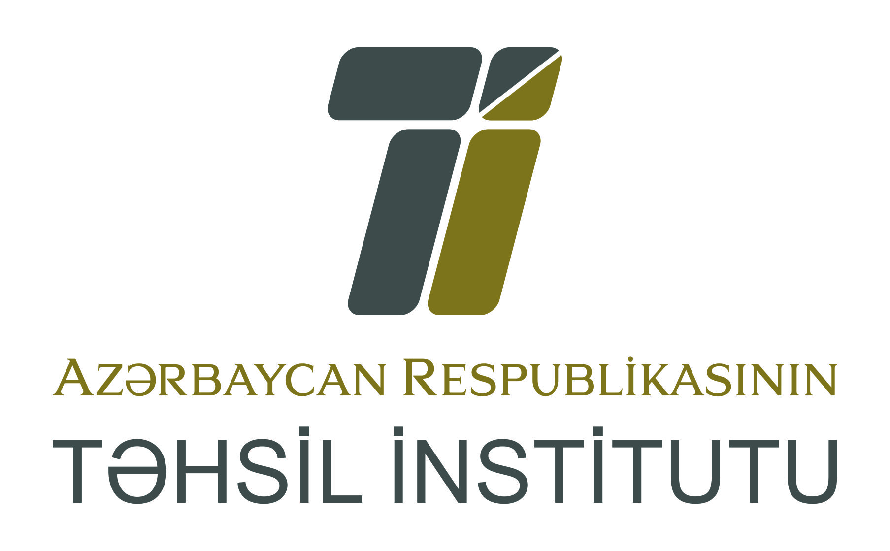 Təhsil İnstitutunun loqosu